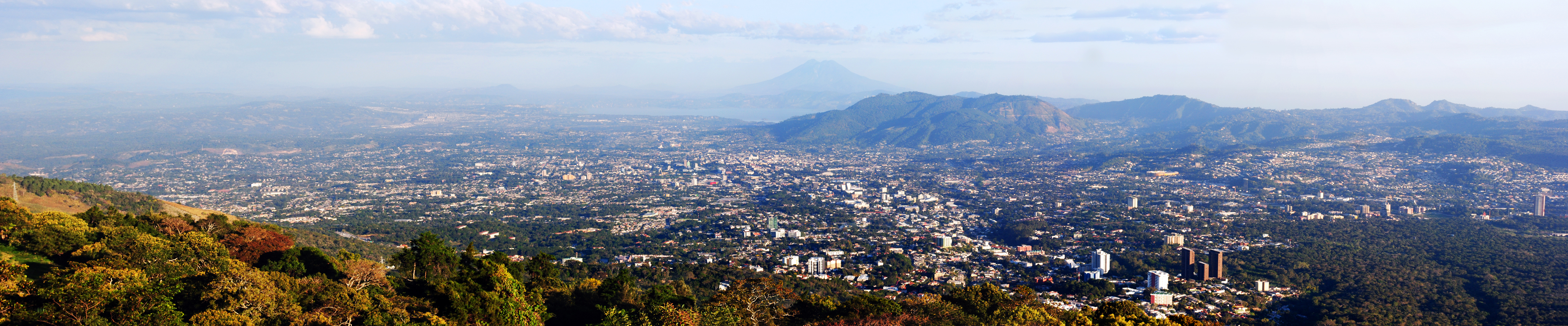 El gran San Salvador